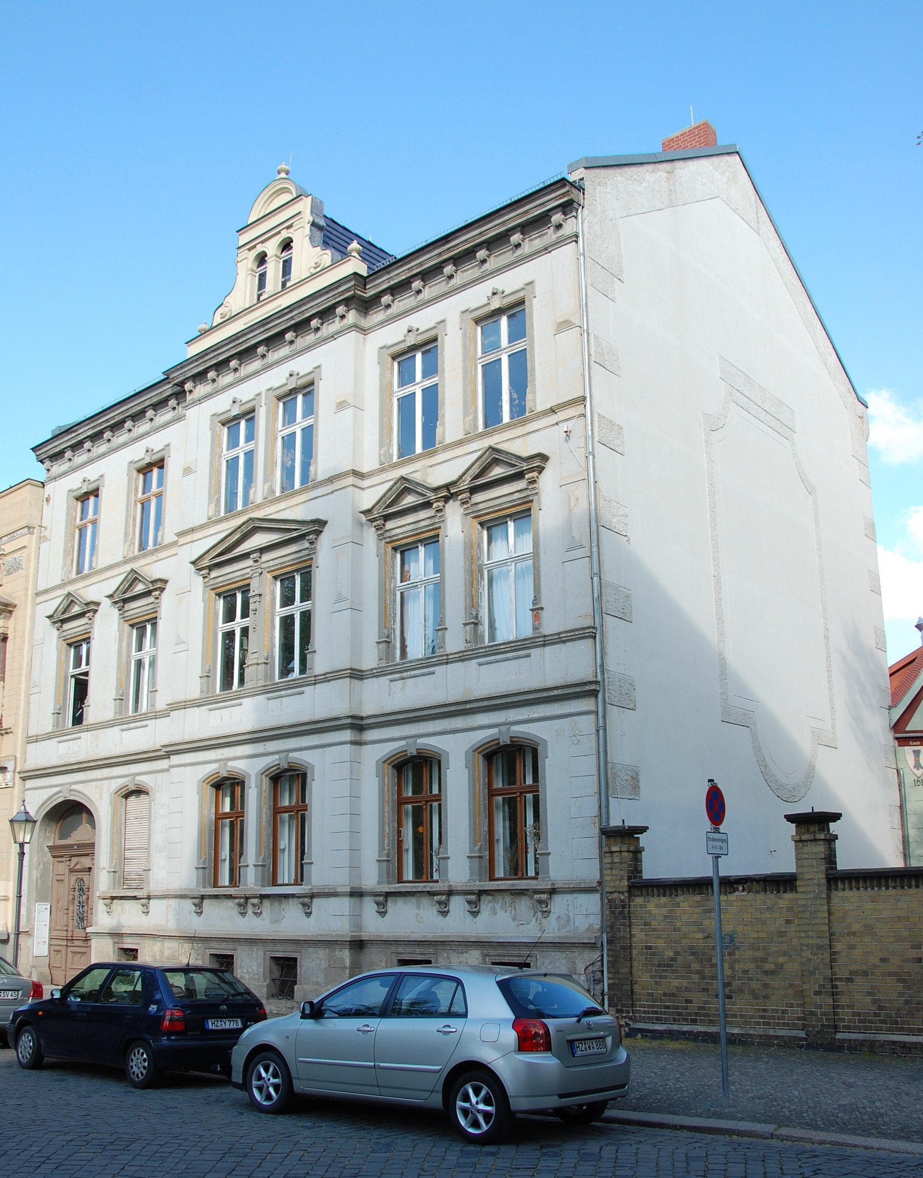 Haus Pöllle 35 in Quedlinburg